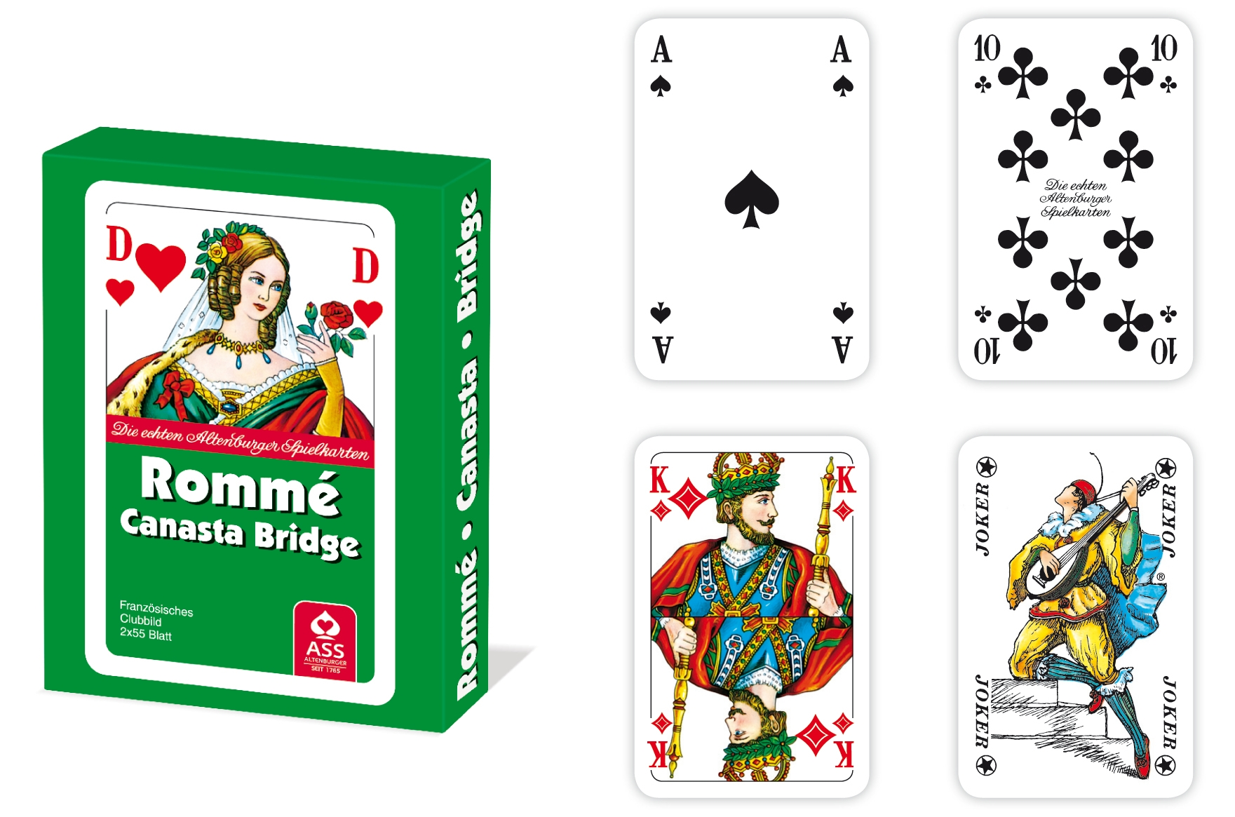 ASS Rommé franz. Bild, 2 x 52 Karten + 6 Joker